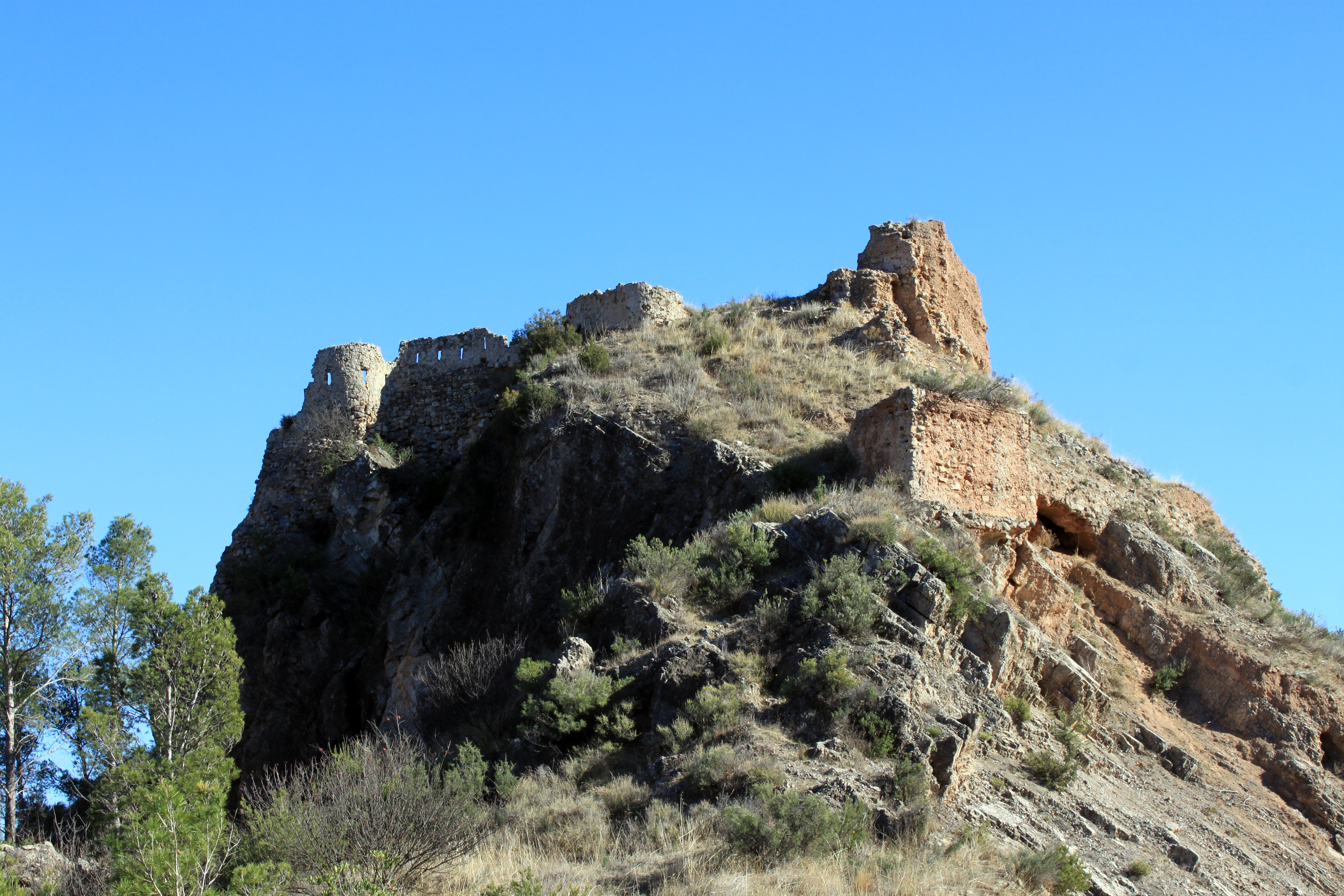 Castillo de Domeño, provincia de Valencia, Comunidad valenciana, España.